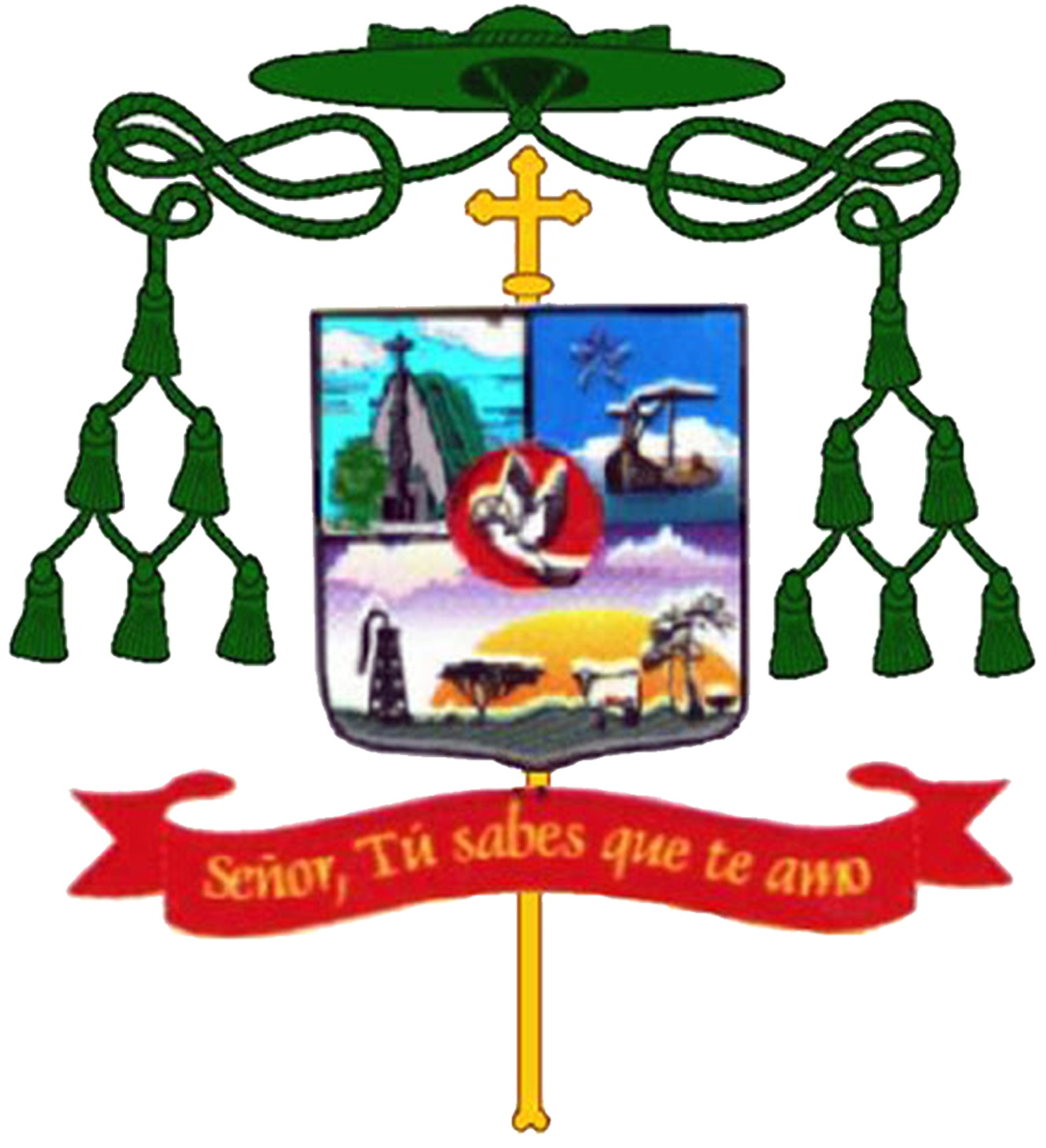 Escudo Episcopal de Monseñor Víctor Manuel Pérez, Obispo de Apure.